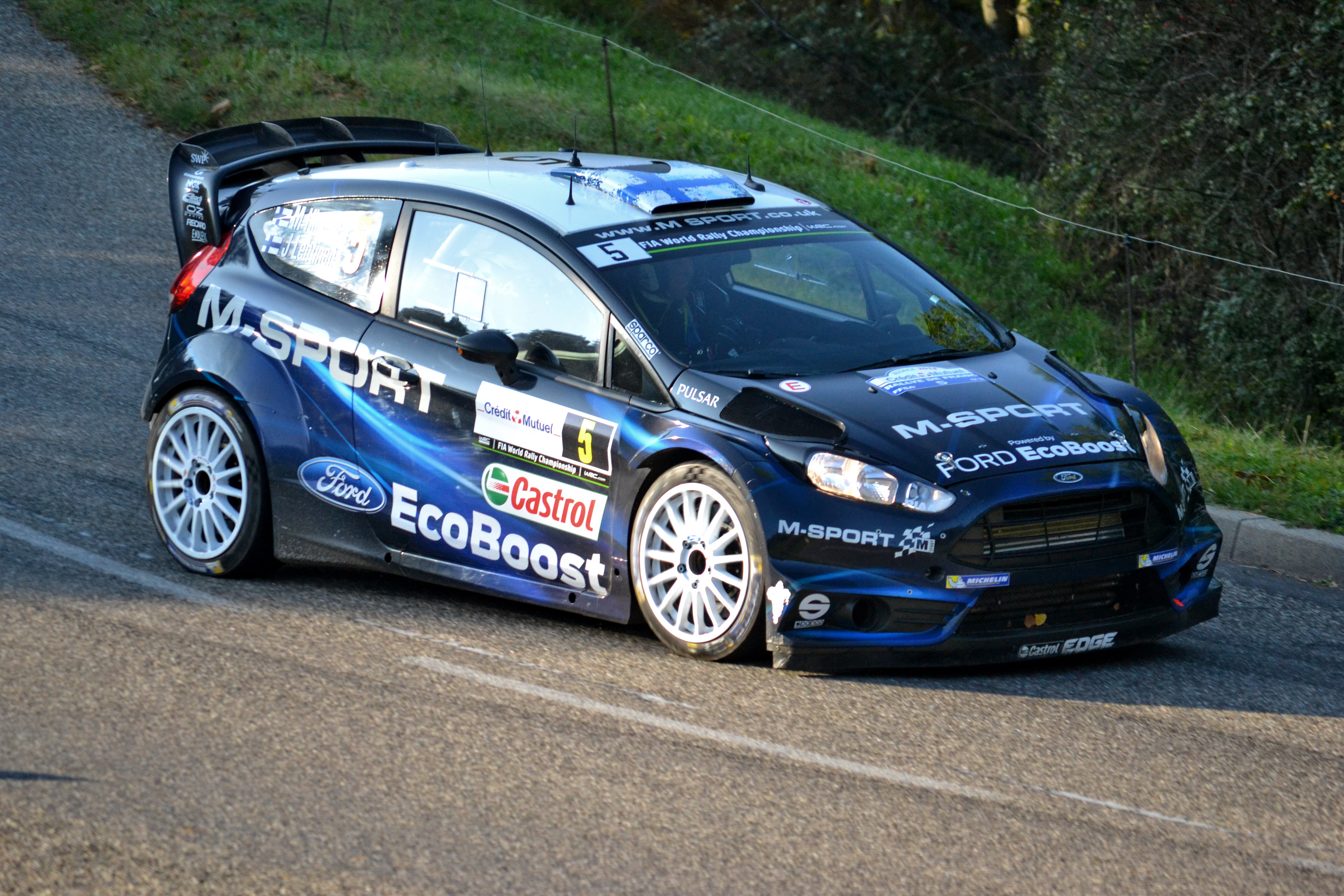 Rallye WRC France-Alsace 2014, ES9 Soultzeren - Le Grand Hohnack 1 à Labaroche. Ford Fiesta RS WRC - Mikko Hirvonen - Jarmo Lehtinen